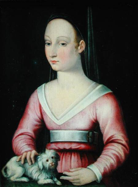 Portrait of Agnès Sorel (1422-1450)